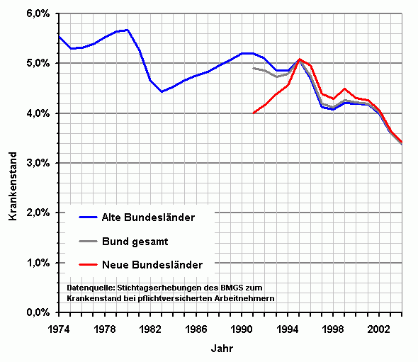 Inhalt/Content: Entwicklung des Krankenstandes in Deutschland 1974 bis 2004 Autor der Grafik: Thomas Grobe 11/2005; Datengrundlage: Grafik nach veröffentlichten Statistiken des Bundesministeriums für Gesundheit und Soziale Sicherung (BMGS) zu Krankenständen an Stichtagen bei pflichtversicherten GKV-Mitgliedern BMGS